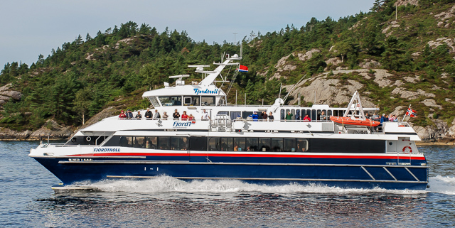 MS Fjordtroll i 2010